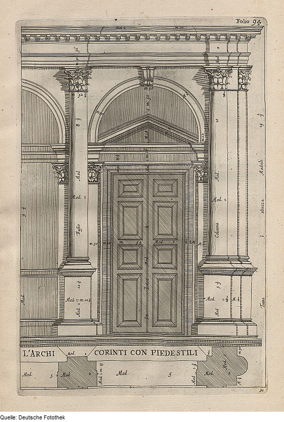 Original image description from the Deutsche Fotothek Architektur & Kapitell & Volute & Akanthus & Postament & Piedestal & Bogen & Säule